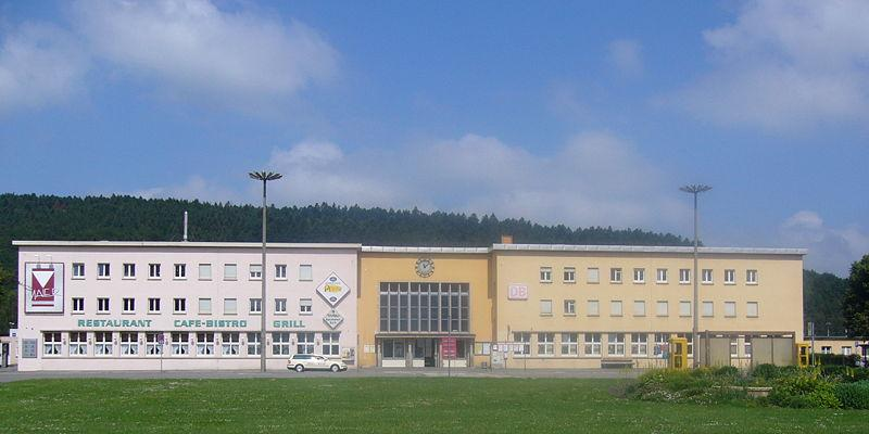 Bahnhof Tuttlingen, Empfangsgebäude, Gesamtansicht. Baden-Württemberg, Deutschland.